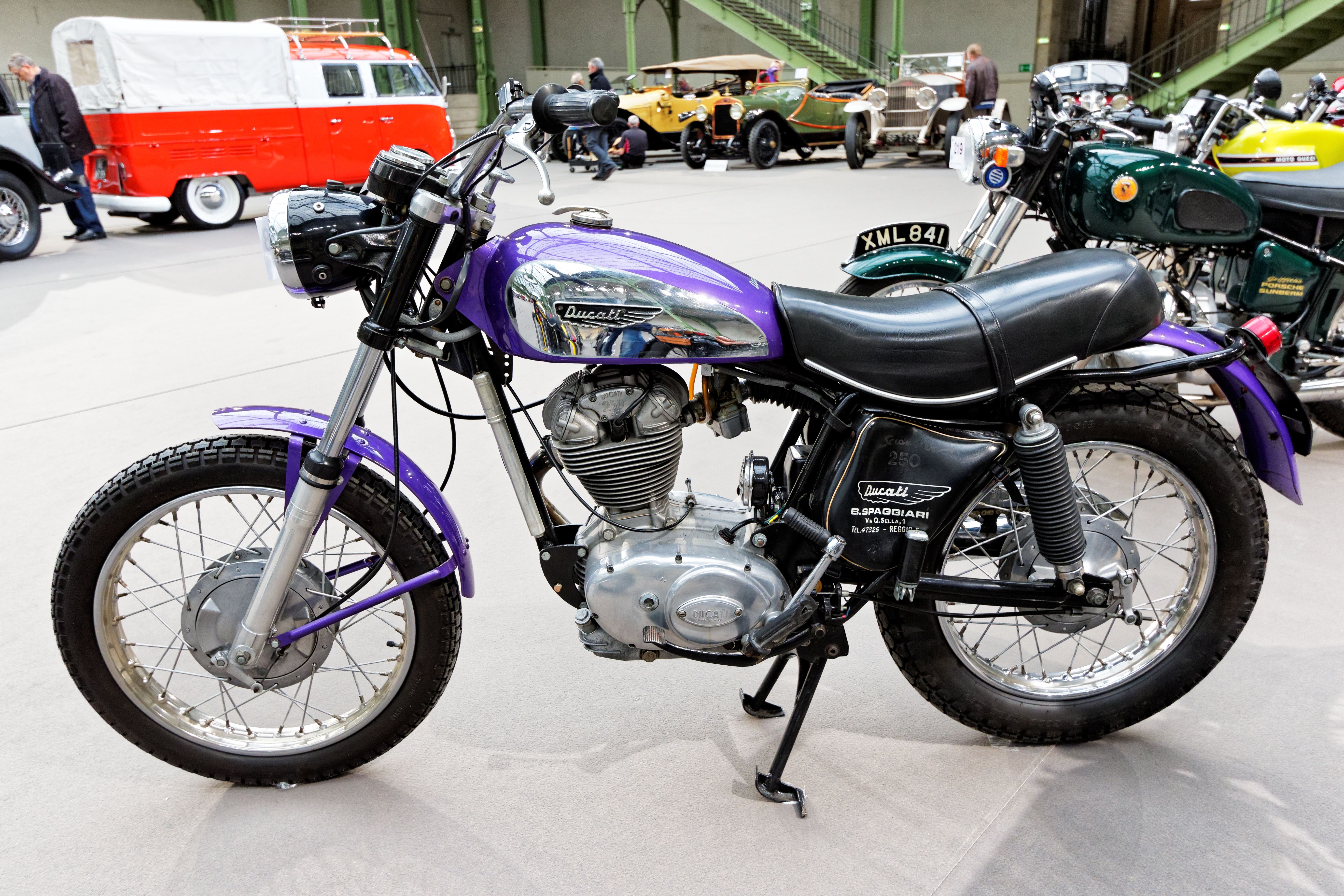 Un des véhicules présenté lors de la vente aux enchères Bonhams 2016 au Grand Palais de Paris.